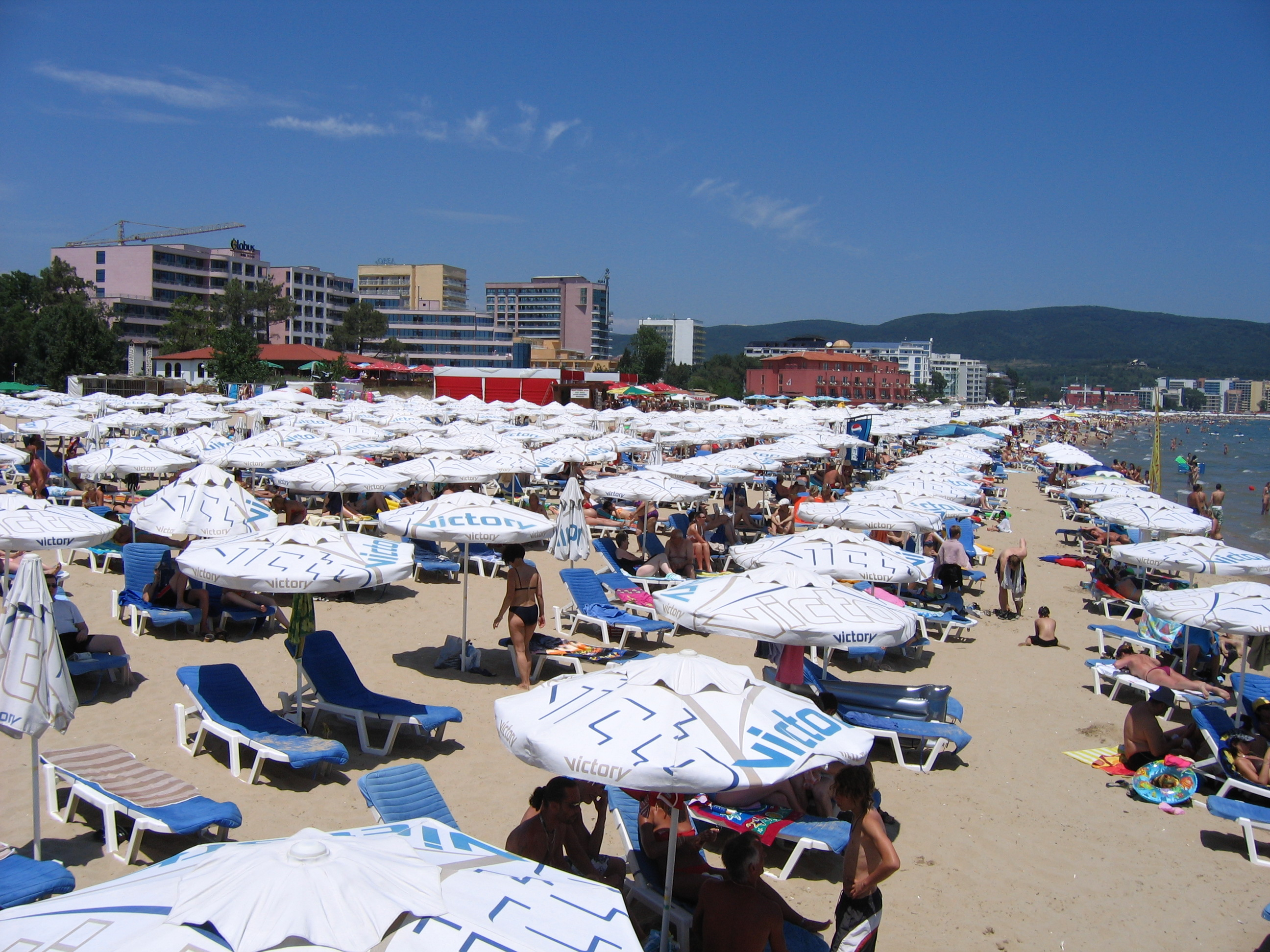 Плажа на Слънчев бряг (юни 2006 г.)